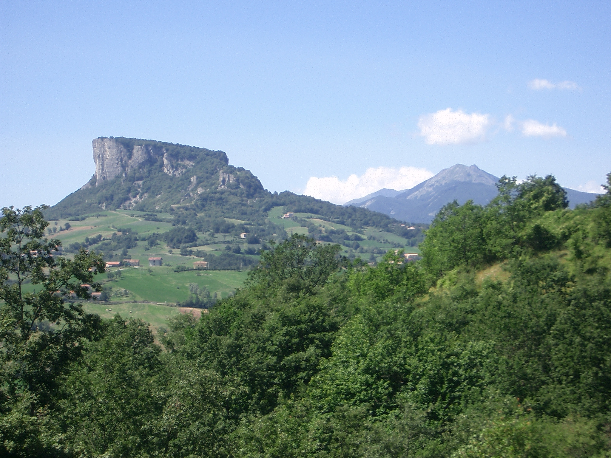 Questa foto è stata scattata da Fabio da Milano (ManuGino).